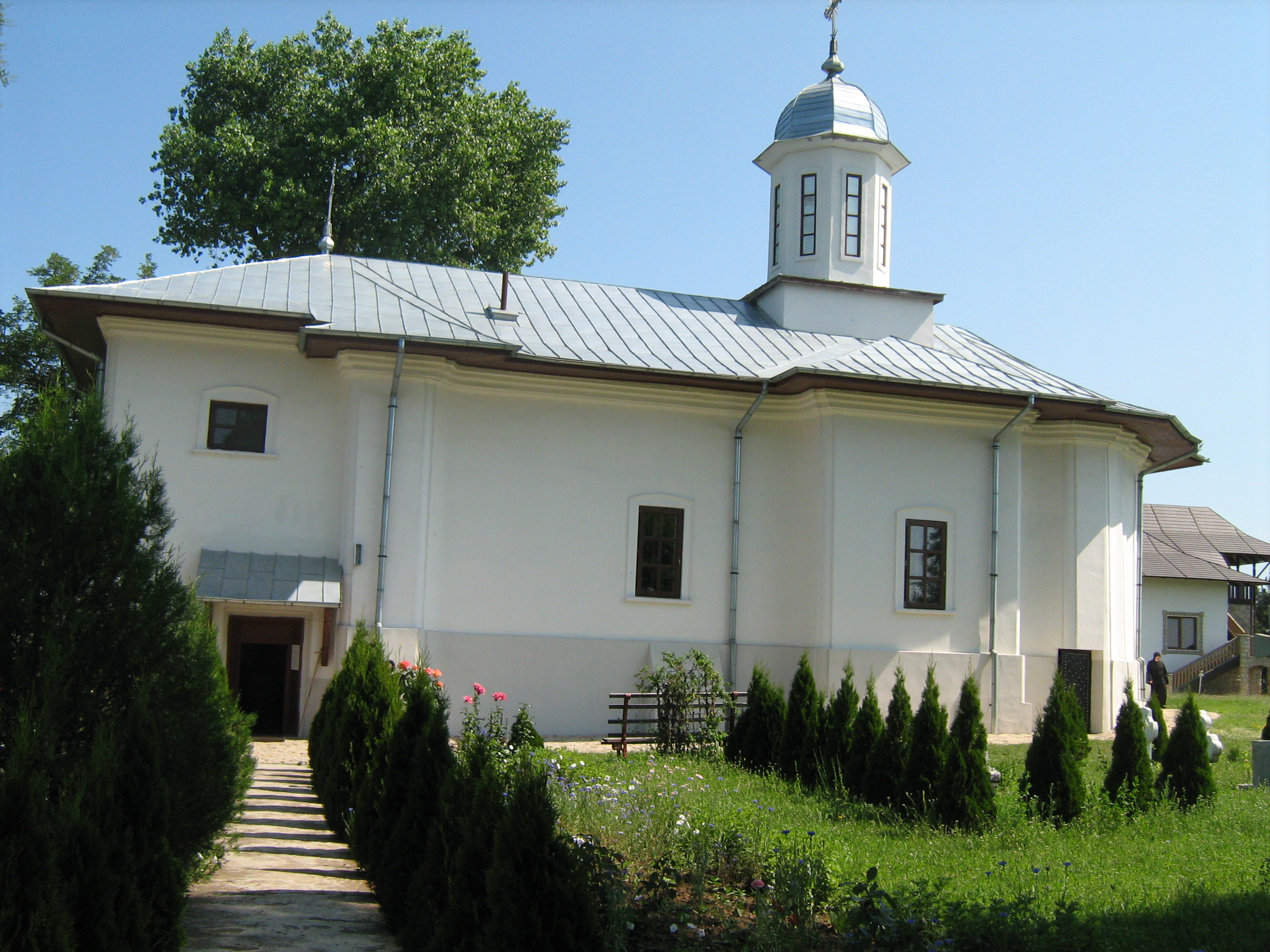 Biserica "Adormirea Maicii Domnului"